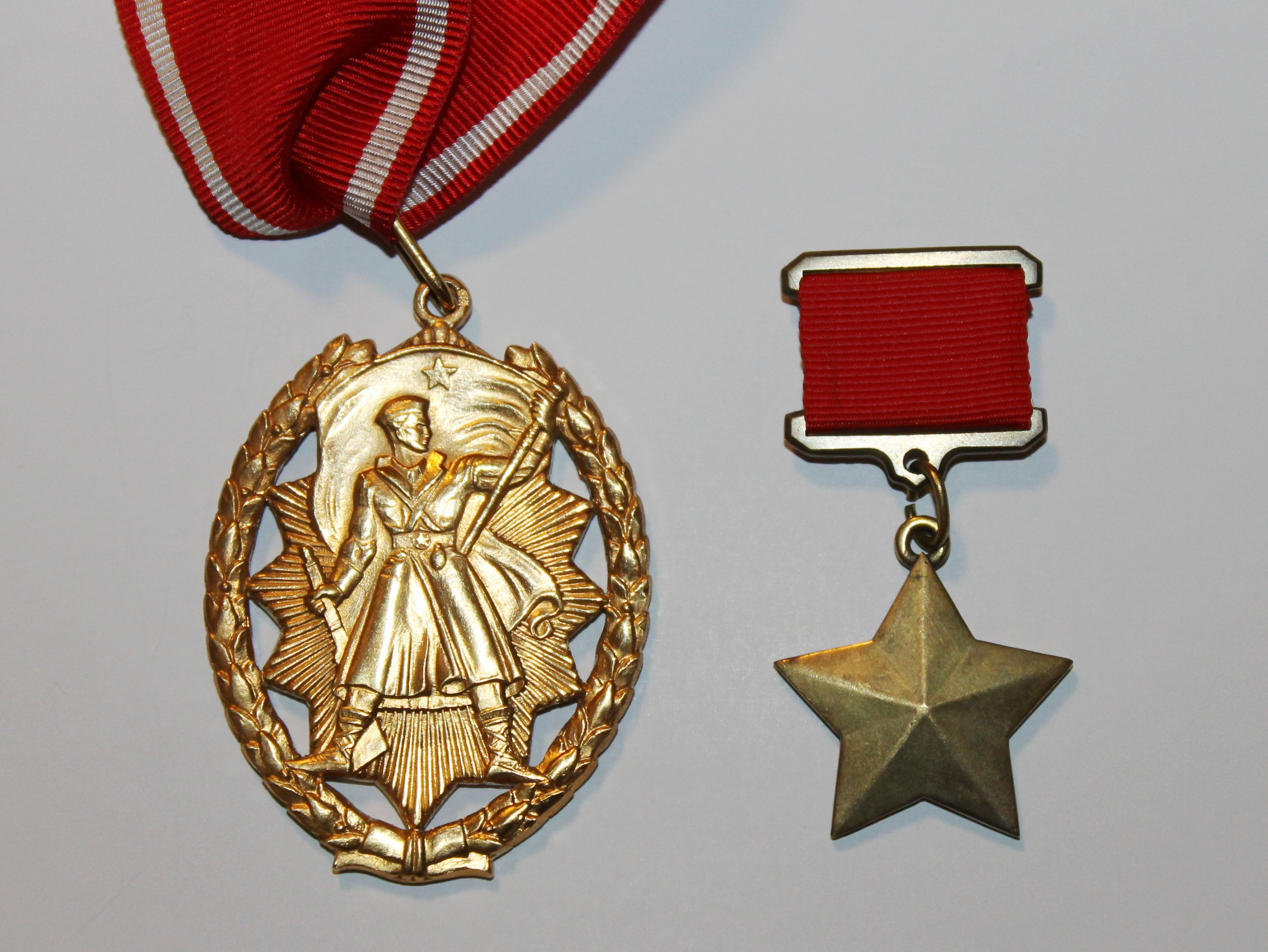 Орден народног хероја и Медаља Златна звезда хероја Совјетског Савеза